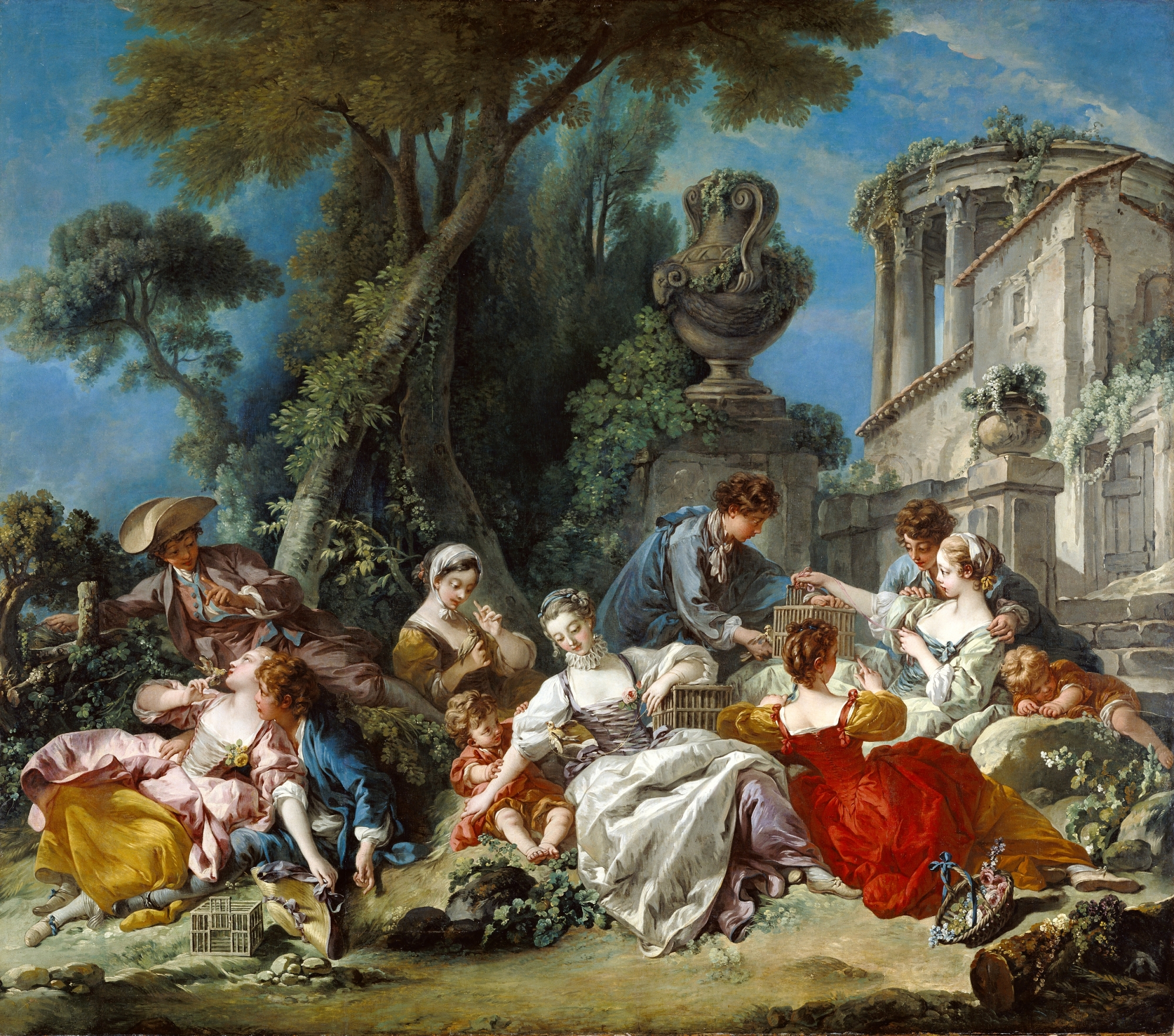 Plan zum Vogel fangen